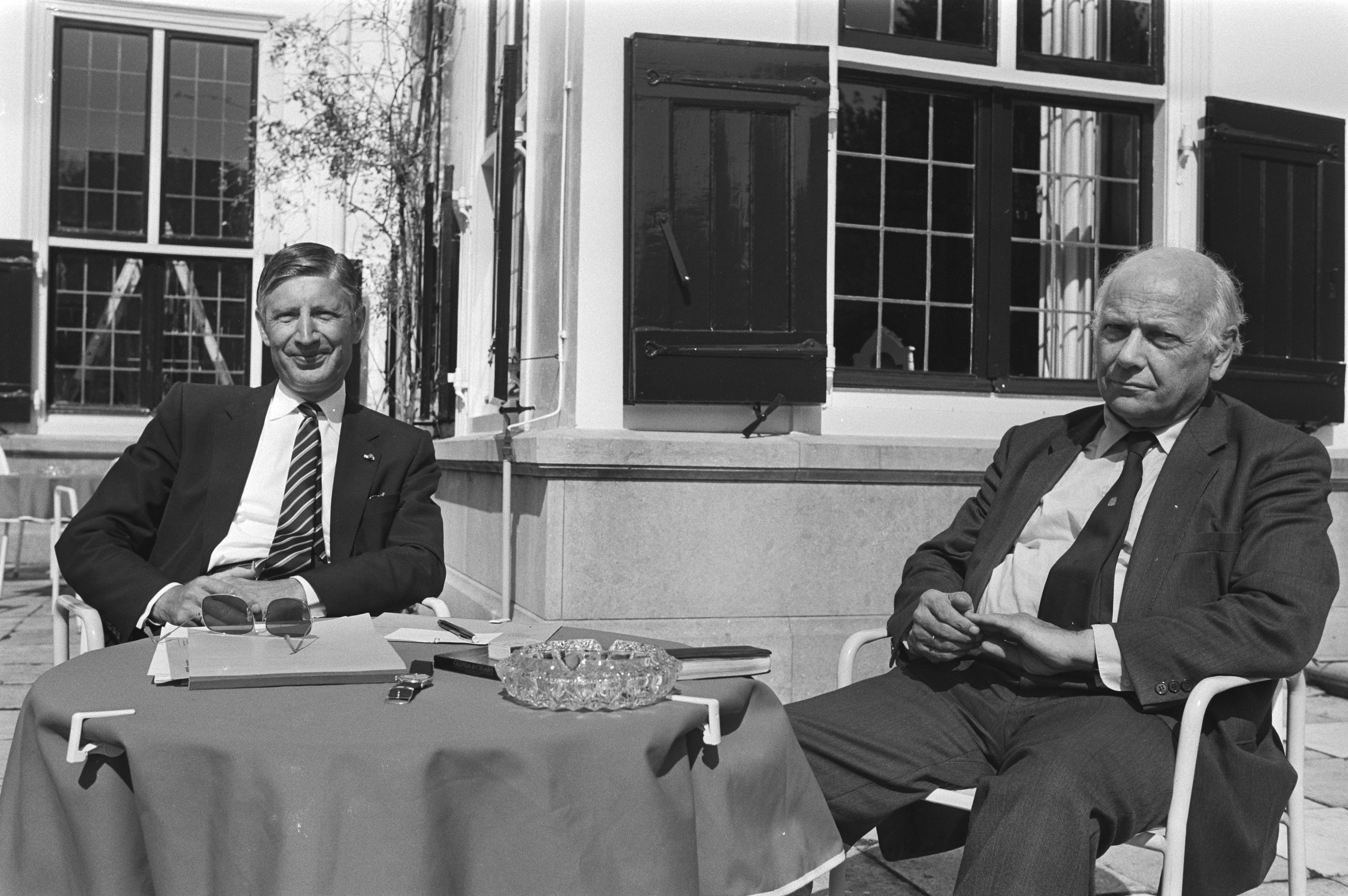 Collectie / Archief : Fotocollectie Anefo Reportage / Serie : Kabinetsformatie 1981 Beschrijving : Aan de linkerzijde formateur Dries van Agt (CDA) en rechts Joop den Uyl (PvdA) in gesprek op het bordes van het Catshuis tijdens de kabinetsformatie van 1981 Datum : 3 september 1981 Locatie : Den Haag, Zuid-Holland Trefwoorden : kabinetsformaties, politici Persoonsnaam : Agt, Dries van, Uyl, Joop den Fotograaf : Bogaerts, Rob / Anefo, [onbekend] Auteursrechthebbende : Nationaal Archief Materiaalsoort : Negatief (zwart/wit) Nummer archiefinventaris : bekijk toegang 2.24.01.05 Bestanddeelnummer : 931-6591